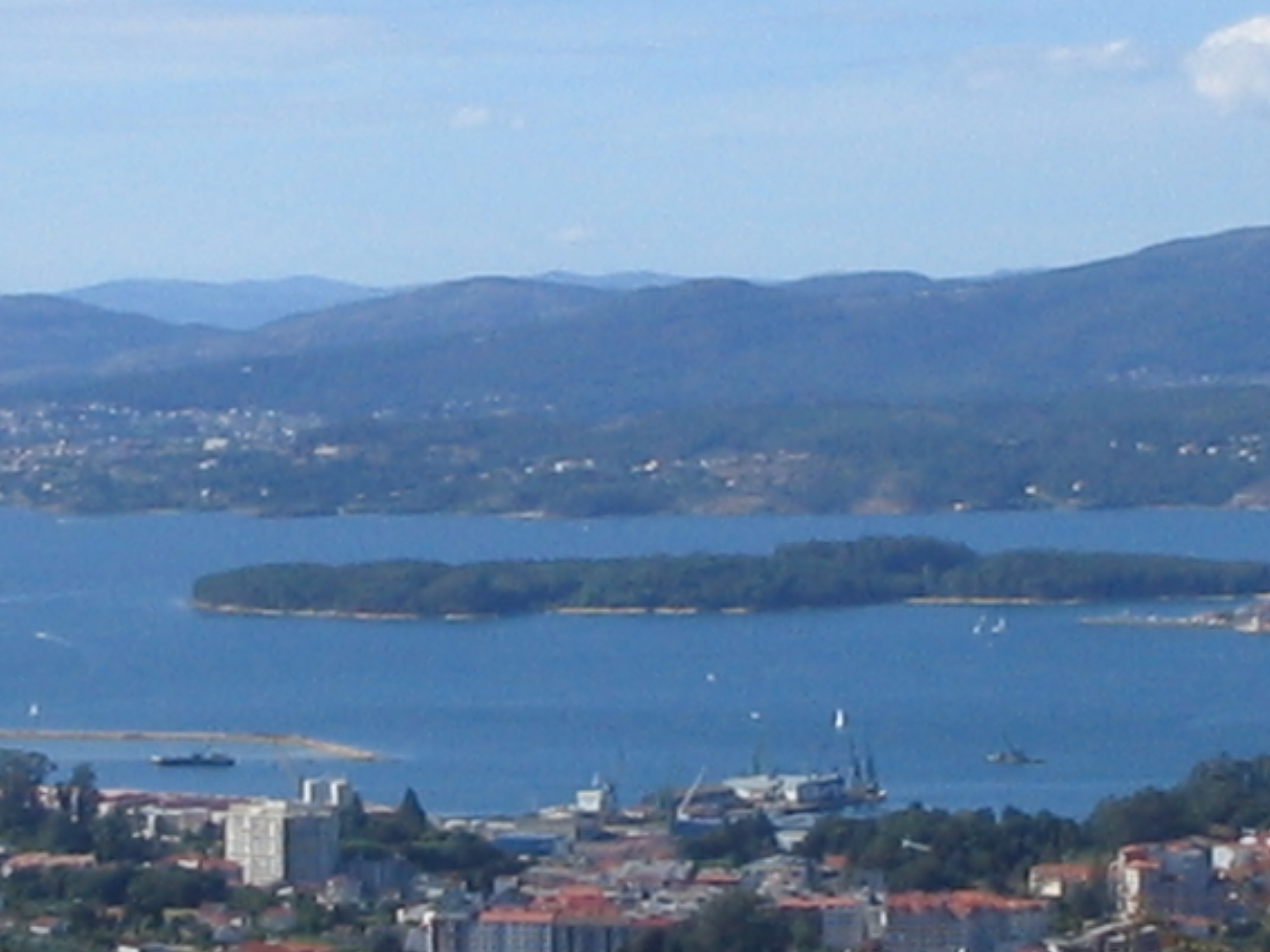 Isla de Cortegada vista desde el Monte Lobeira